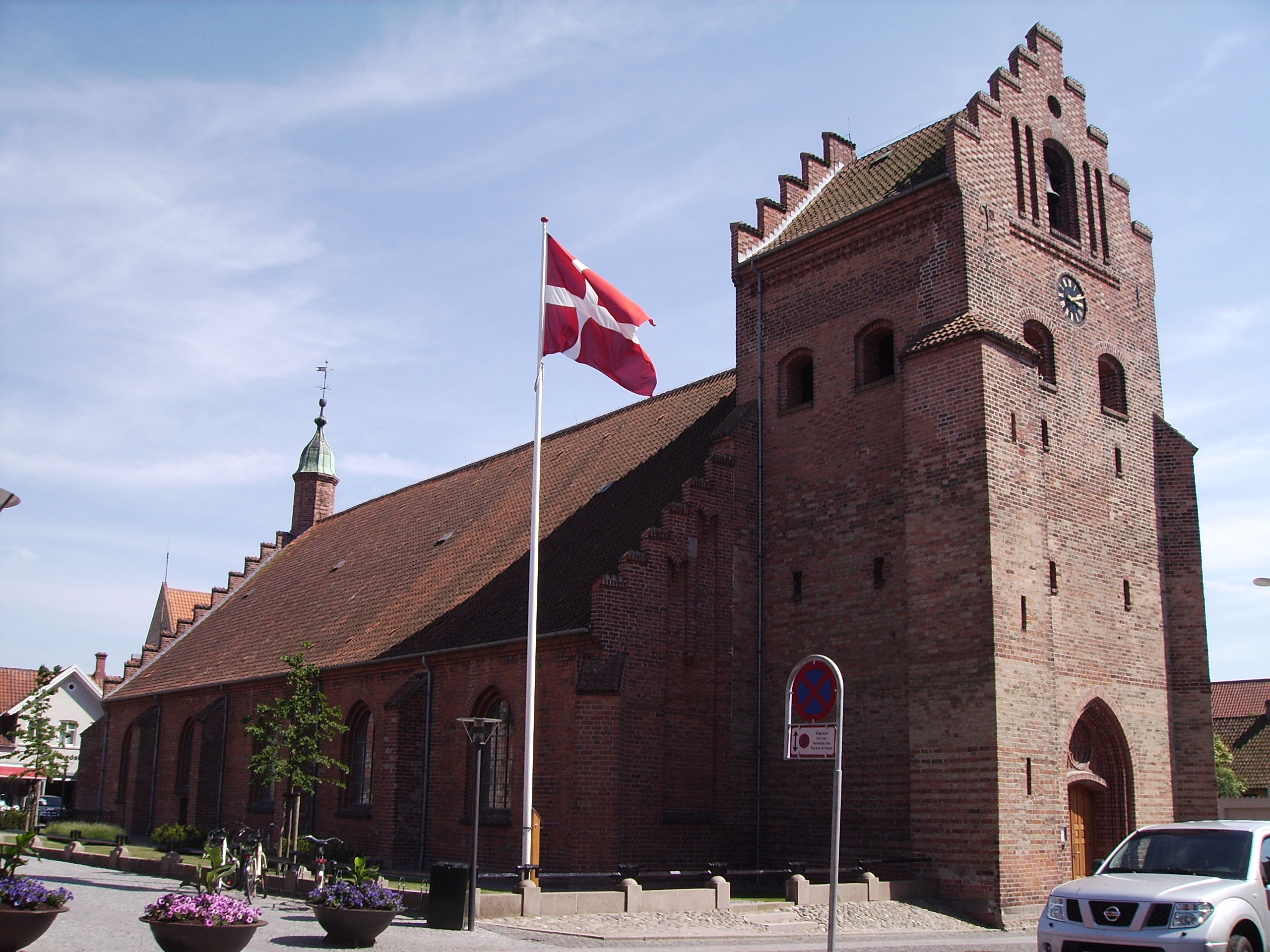 Sankt Laurenti Kirke, Kerteminde Sogn, Bjerge Herred, Odense Amt, Denmark (Danish Church) - Sankt Laurenti Kirke fra nordvest